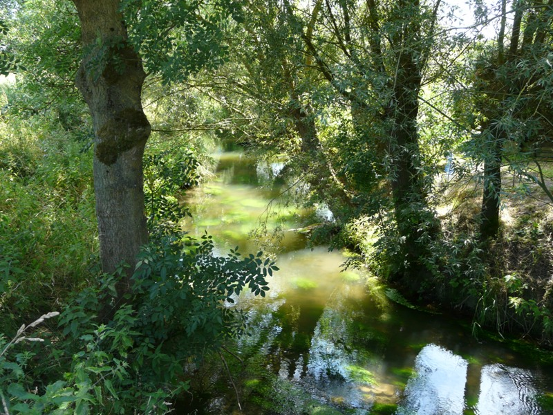 La traversée de la Rhônelle par Famars